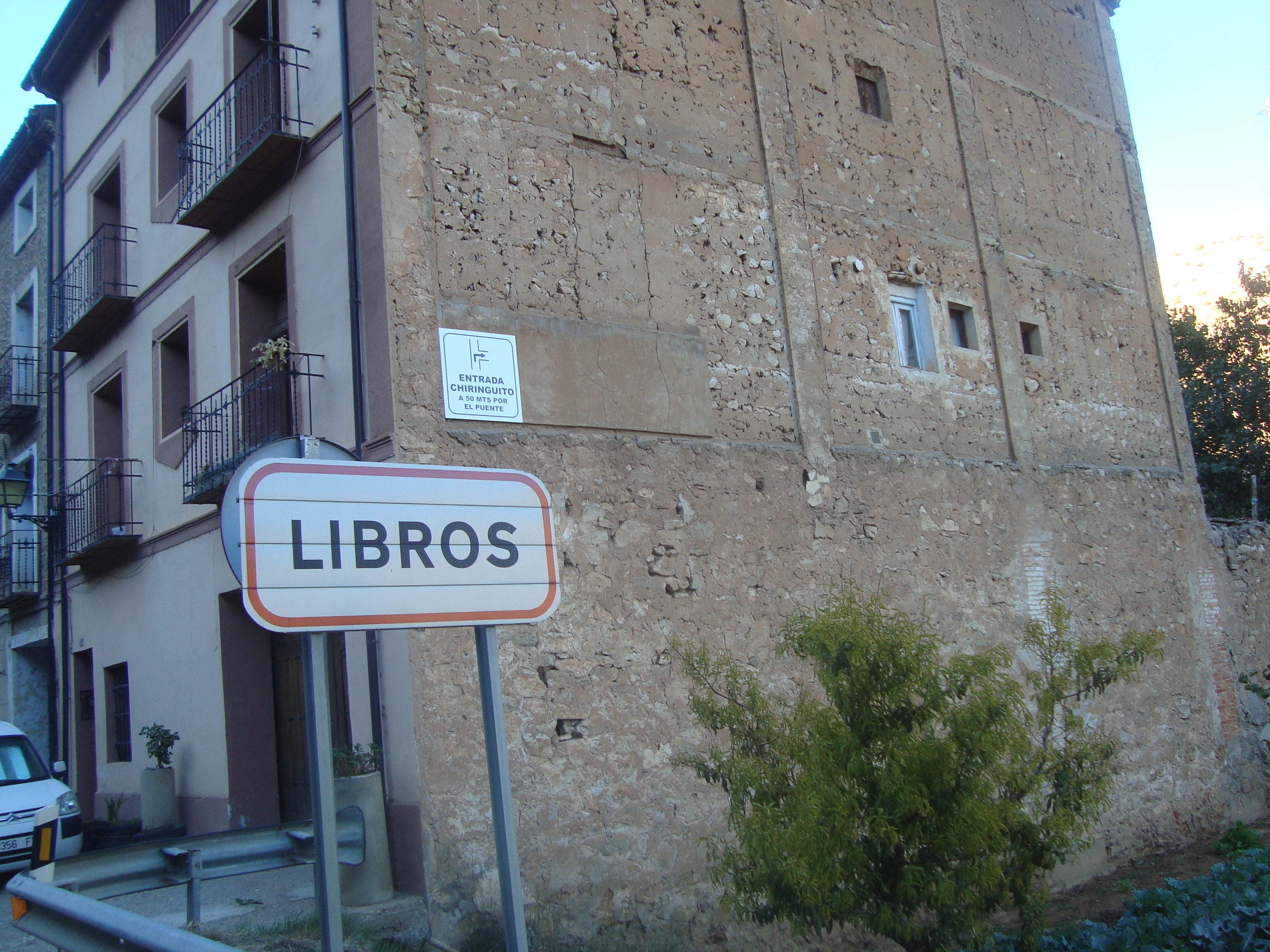 Libros es una localidad y municipio de la provincia de Teruel, en Aragón, España. Está situada a orillas del río Turia y a 26 Km de la capital de provincia Teruel.